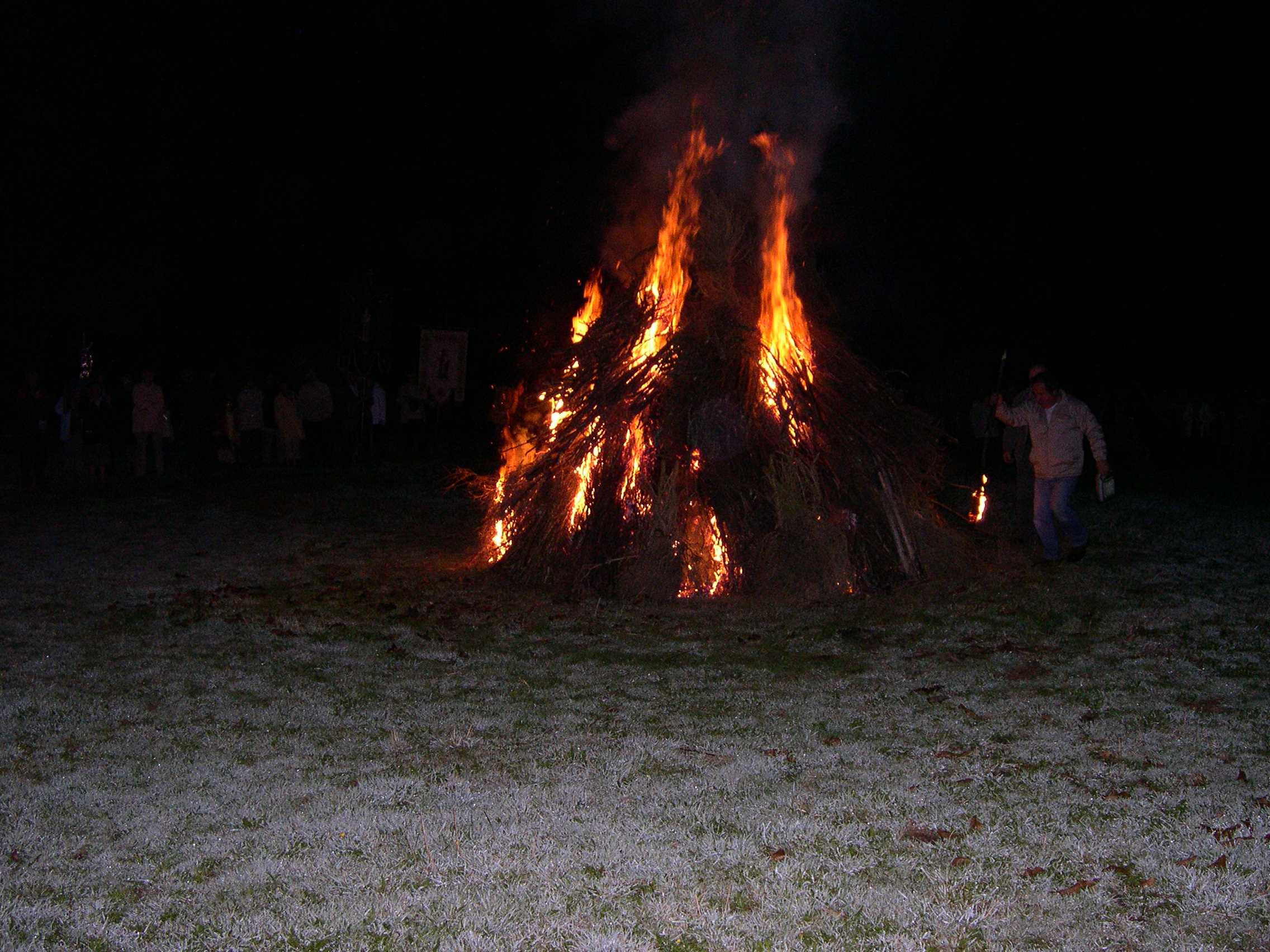 Tantad Pardon Bulad 2009